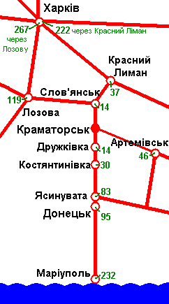 Відстані від ст. Краматорськ: Відстані від ст. Краматорськ